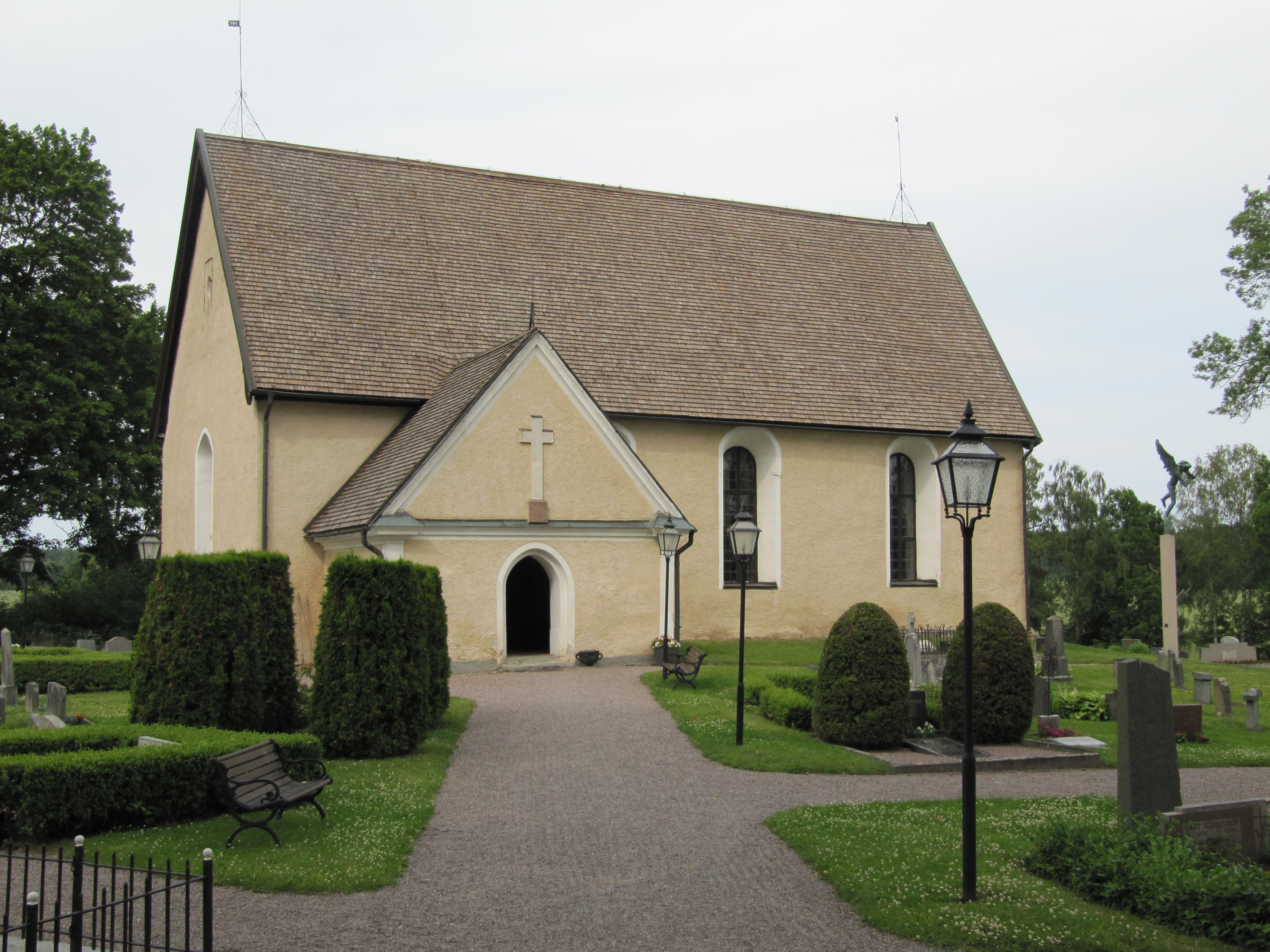 Lagga kyrka från sydväst